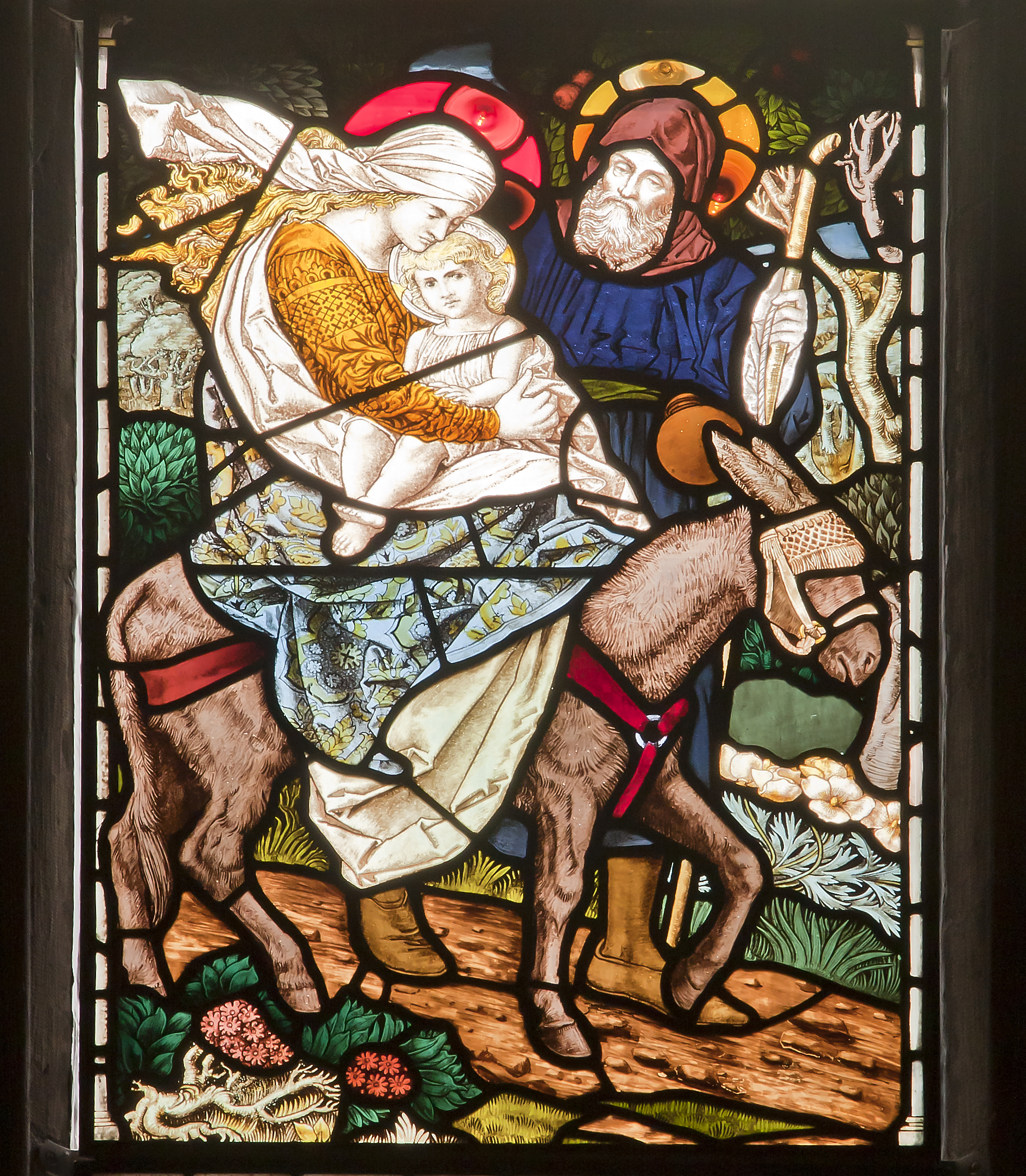 Kyrkfönster från 1800-talet i Nikolai kyrka i Örebro efter kartong av Carl Almquist. Motivet föreställer den heliga familjens flykt till Egypten för att undkomma Herodes.